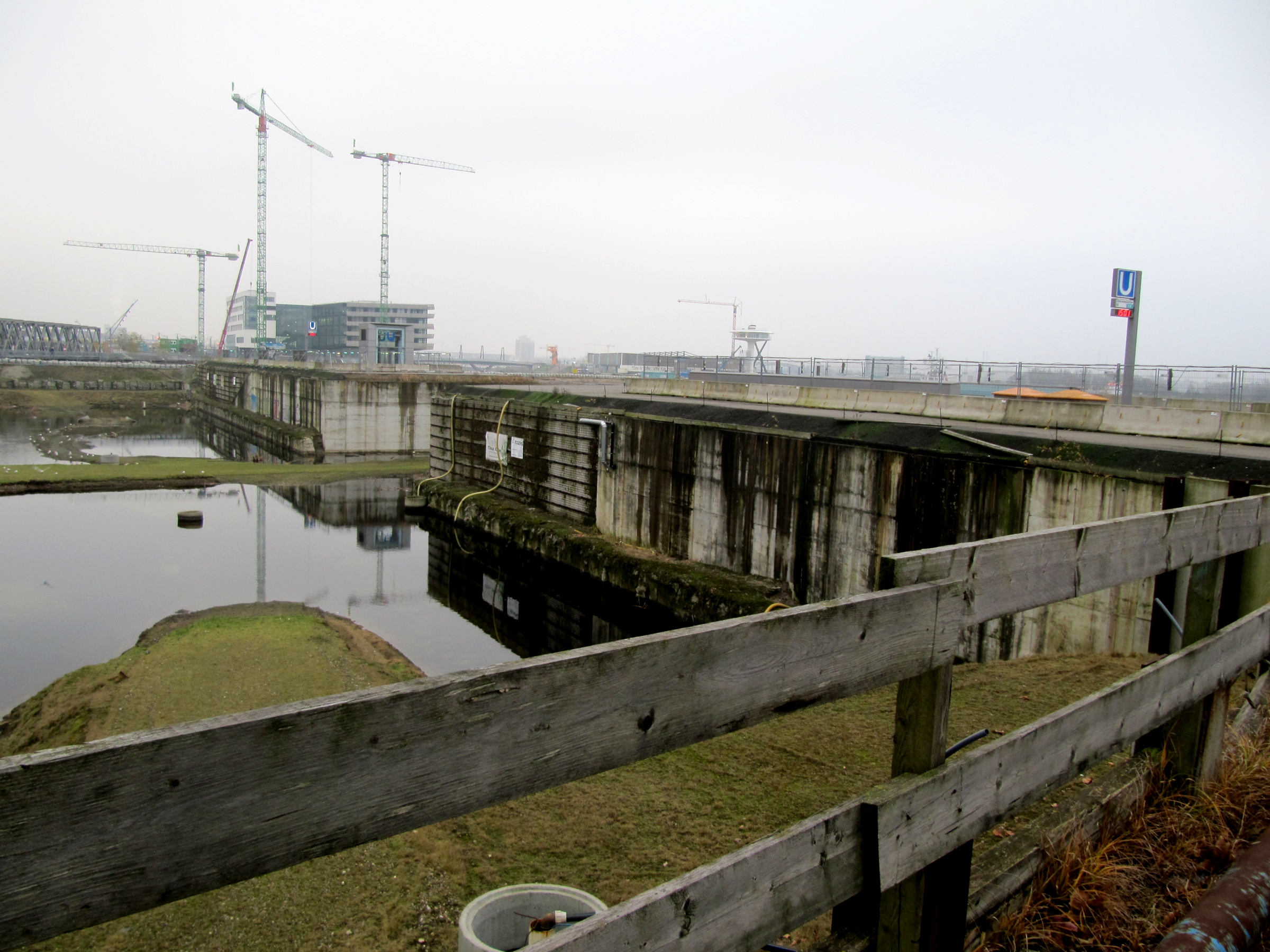 Zugänge zum U-Bahnhof Überseequartier in Hamburg, HafenCity